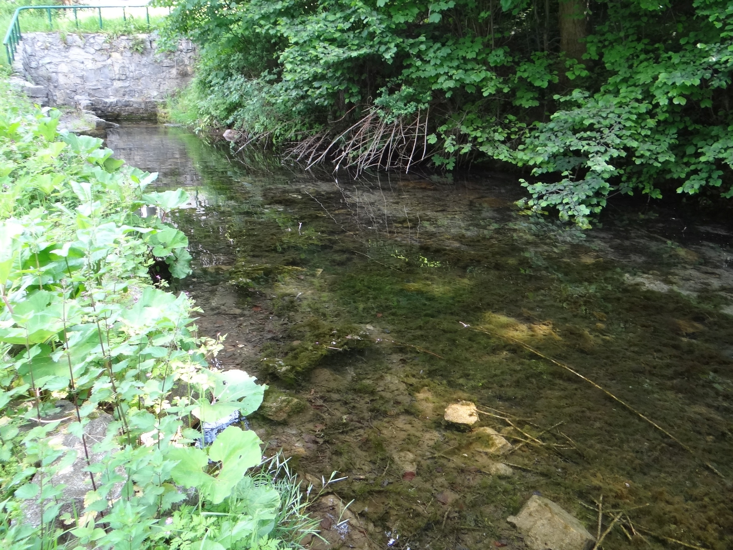 Źródło Pióro w Dolinie Szklarki